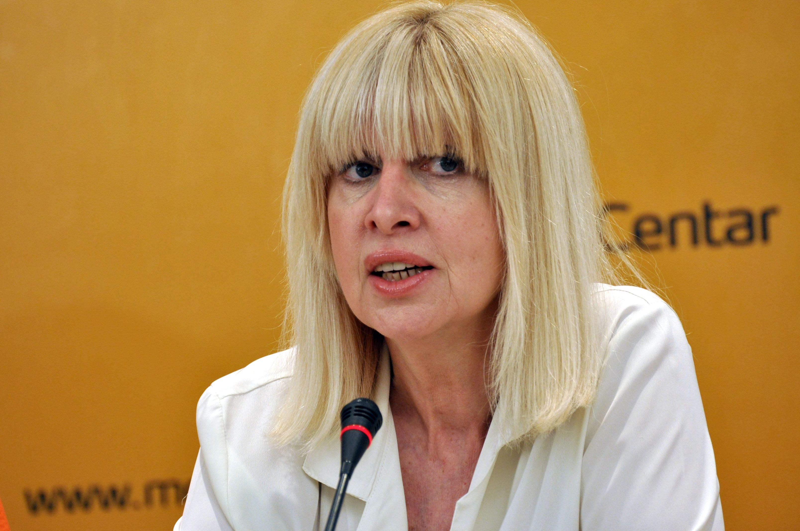 Јелена Тинска Извор: Медија центар Београд Дозвола за објављивање/Медија центар